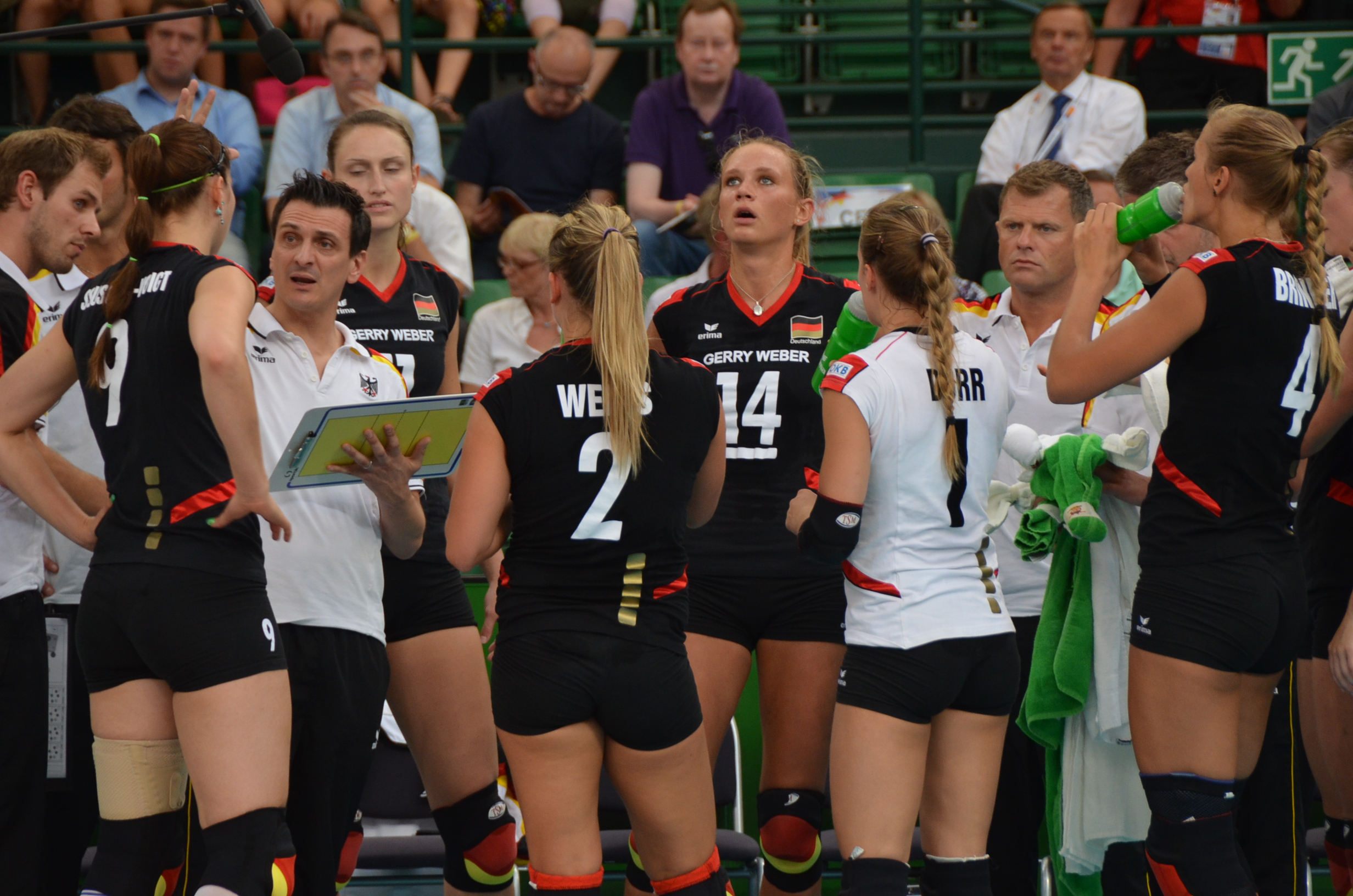 Volleyball-Europameisterschaft der Frauen 2013-Spielort Halle (Westf) Gerry-Weber-Stadion - Spiel 6. September 2013 (Deutschland-Spanien)